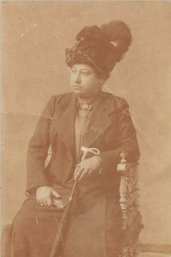 Foto da Professora Julia Wanderley, minha tia-avó, datada de março de 1915, arquivada no album de família, destina a ilustrar o artigo da Wikipédia